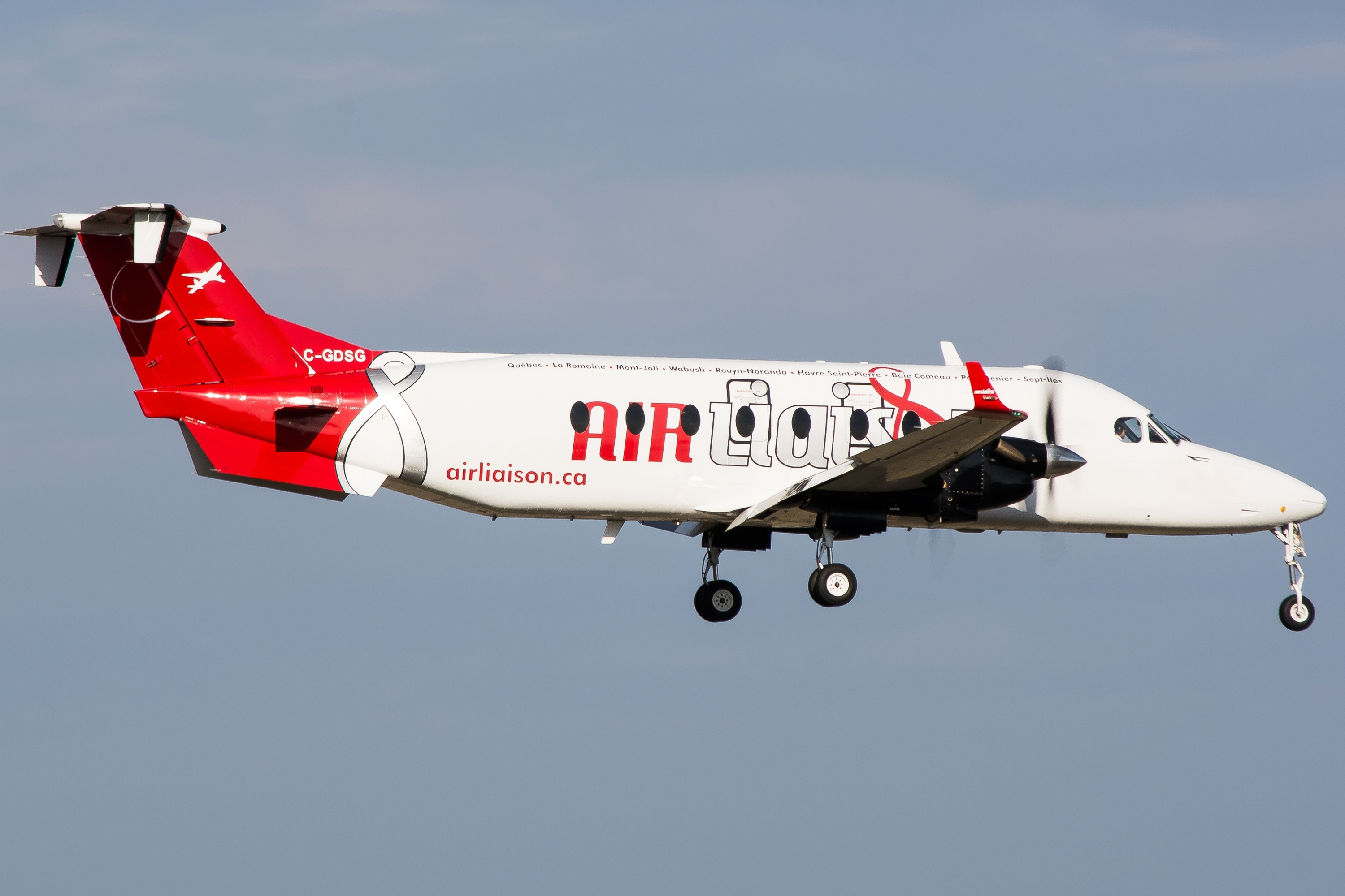 Up side...